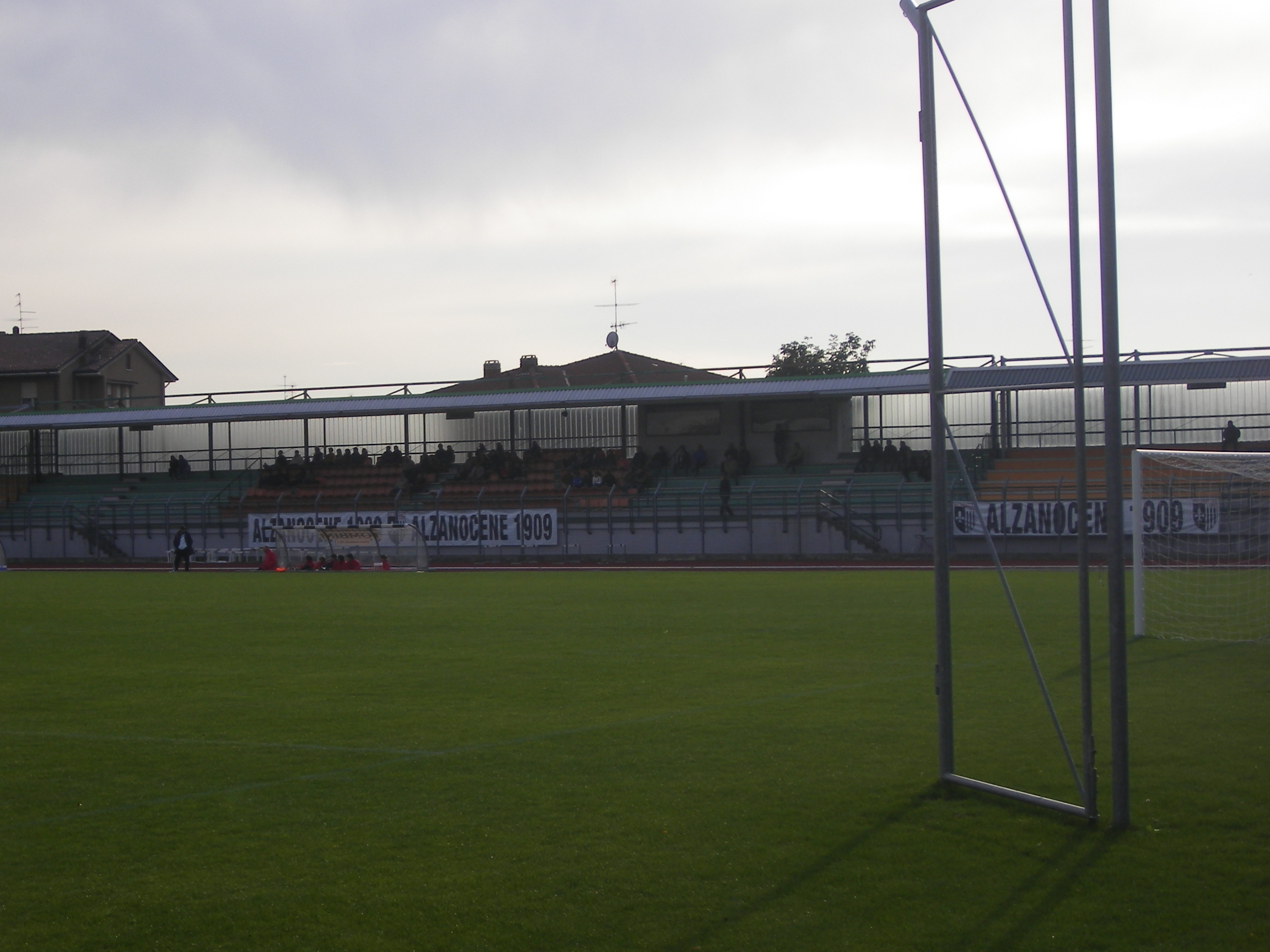 Stadio Carillo Pesenti Pigna, Alzano Lombardo (BG), Italy